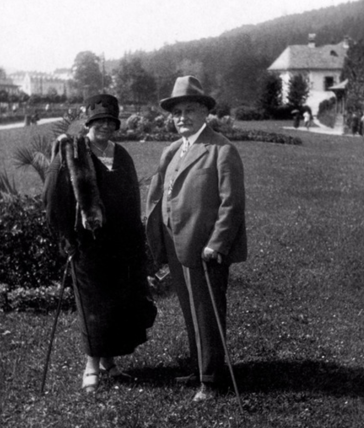 Leóš Janáček a Luhačovice (1920)